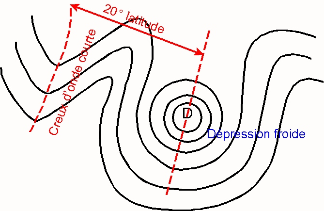 Règle de Henry sur l'ouverture des dépression froides météorologiques dans le flux d'altitude.